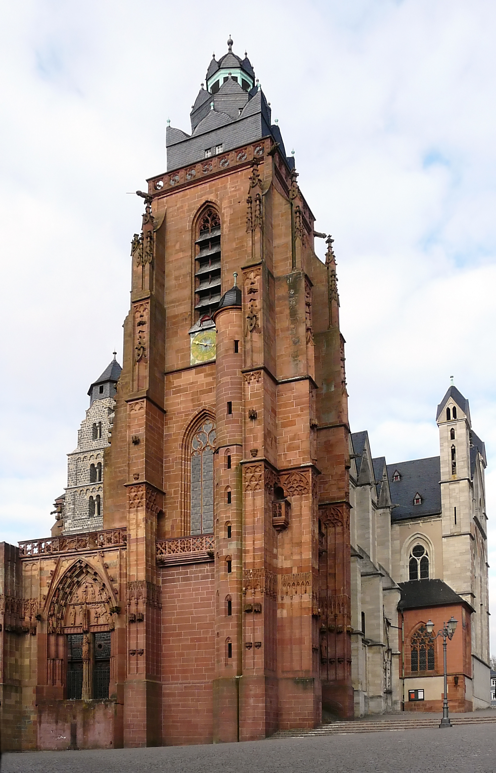 Gesamtansicht von Südwesten des Wetzlarer Doms, Wetzlar (Hessen)